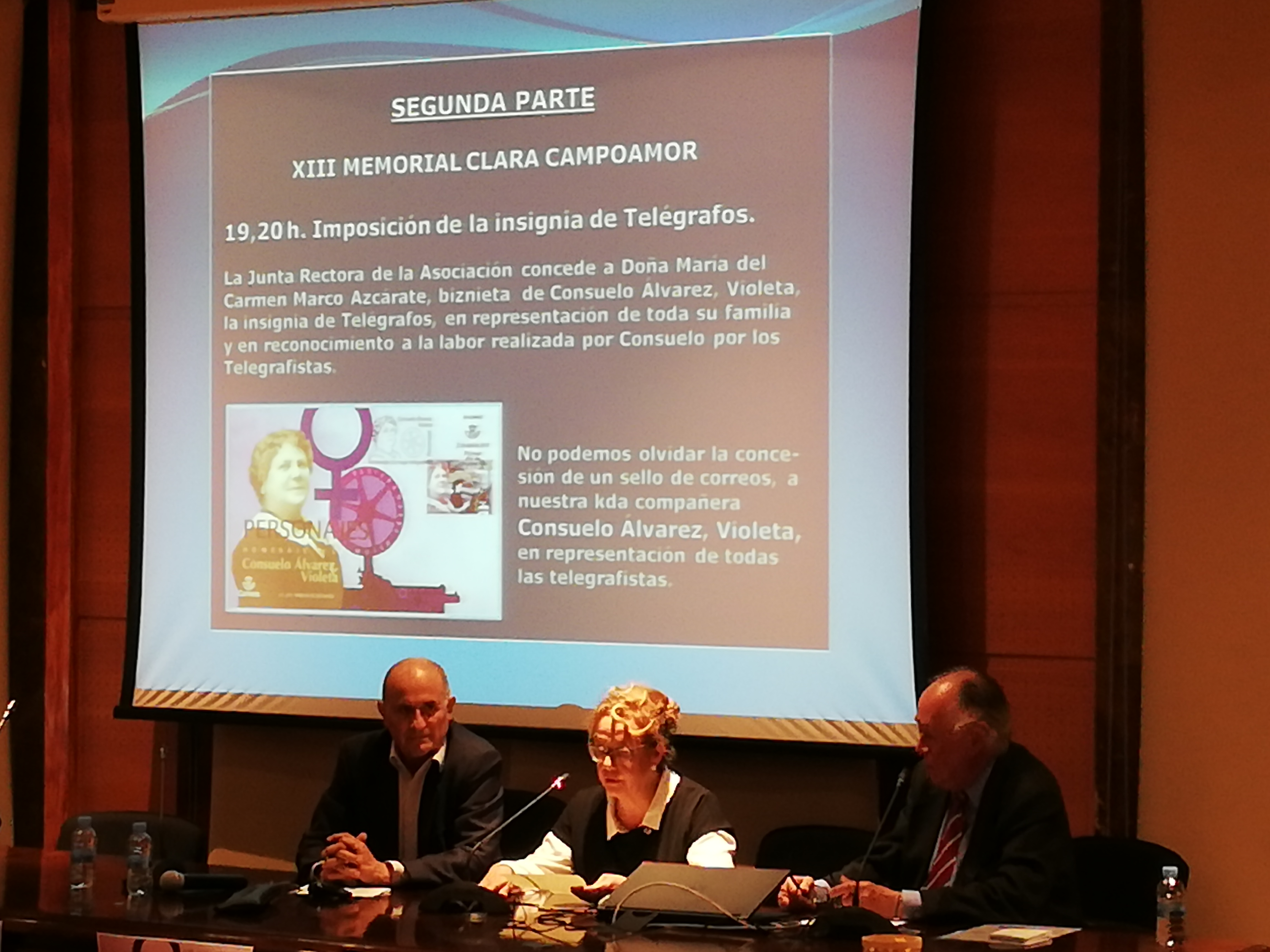 La Asociación de Amigos del Telégrafo, concede a Maria del Carmen Marco Azcárate, biznieta de Consuelo Alvarez, Violeta, la insignia de Telégrafo, en representación de toda su familia y en reconocimiento a la labor que realizó Consuelo Alvarez, Violeta, por los Telegrafistas.